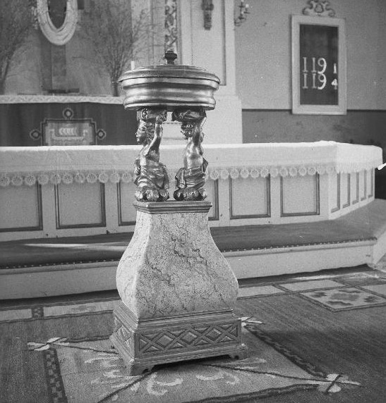 Dopställ, skulpterat, marmorerat och förgyllt trä, finns i inventarieförteckningen sedan 1776, skänkt av fru Reenstierna. Kategori: (04) Dopkärl Dopställ, skulpterat, marmorerat och förgyllt trä, finns i inventarieförteckningen sedan 1776, skänkt av fru Reenstierna.